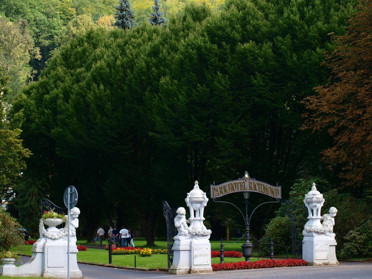 Karlovy Vary - Richmond